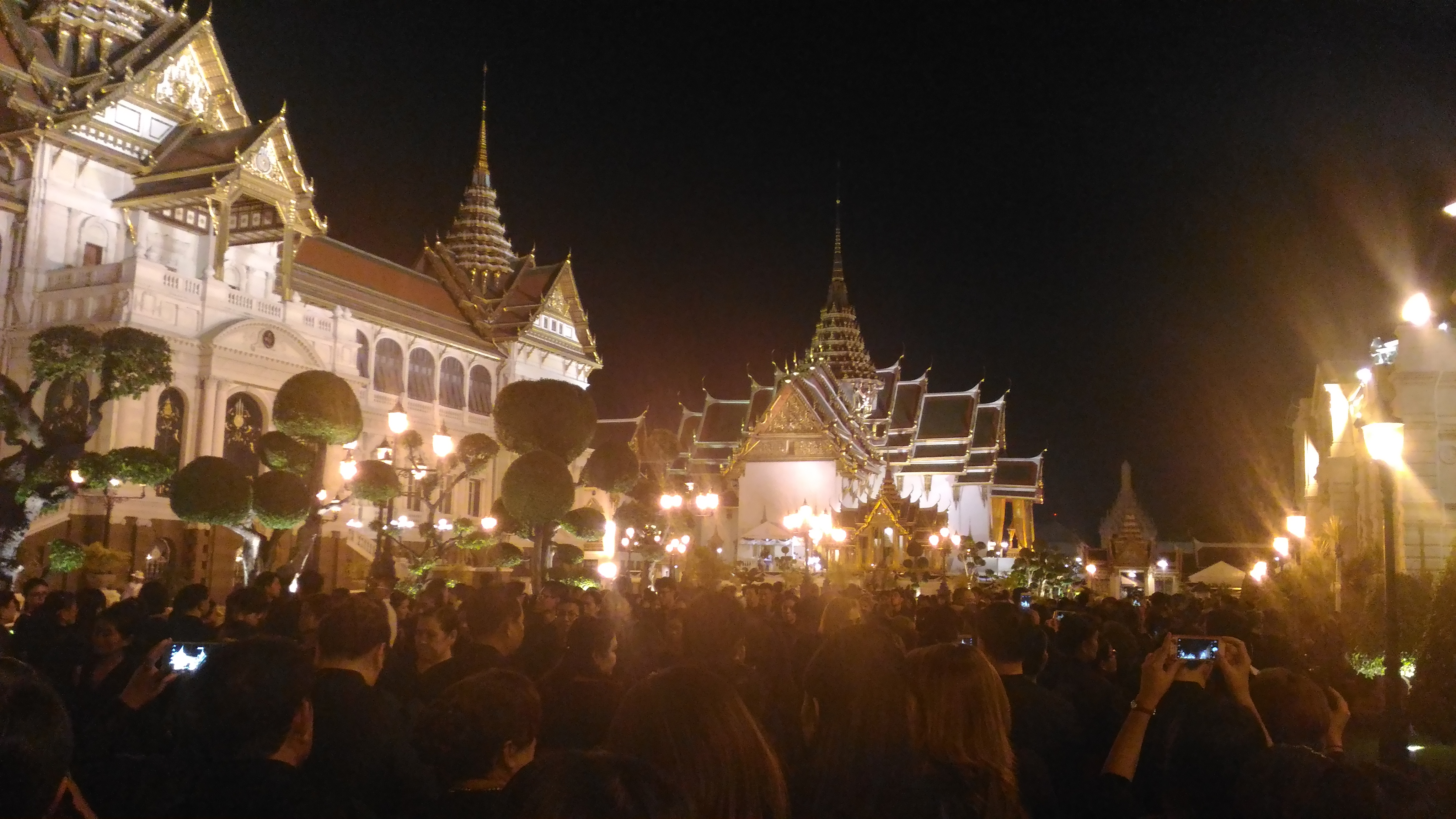 ประชาชนต่อแถวเพื่อรอเข้าสักการะพระบรมศพ พระบาทสมเด็จพระปรมินทรมหาภูมิพลอดุลยเดช สยามินทราธิราช บรมนาถบพิตร ซึ่งประดิษฐาน ณ พระที่นังดุสิตมหาประสาท ในพระบรมมหาราชวัง กรุงเทพฯ บันทึกภาพเมื่อวันที่ ๖ ธันวาคม พ.ศ. ๒๕๕๙